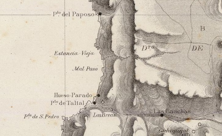 Detalle de Paposo y Taltal en Mapa de Pedro José Amado Pissis en Mapa de la República de Chile de 1884